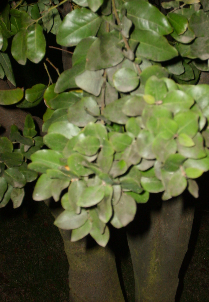 Cryptocarya rubra, Peumo